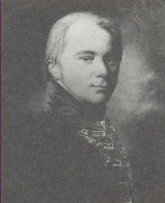 Leopold Friedrich von Kleist (1780–1837), Bruder von Heinrich von Kleist